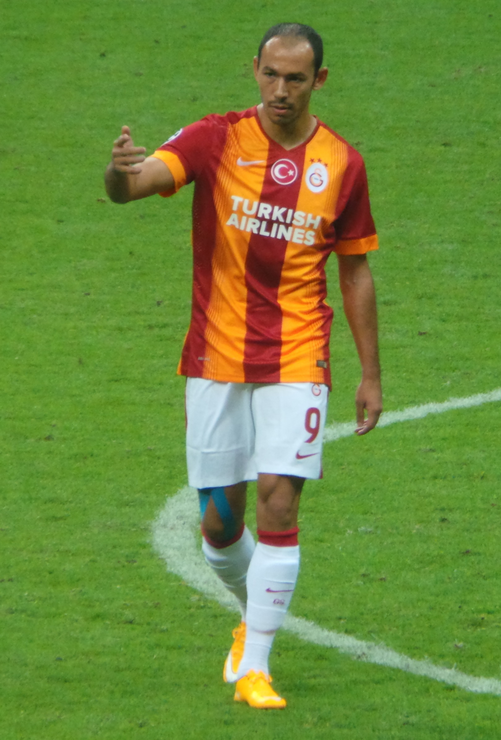 Umut Bulut '14-15 against Anderlecht